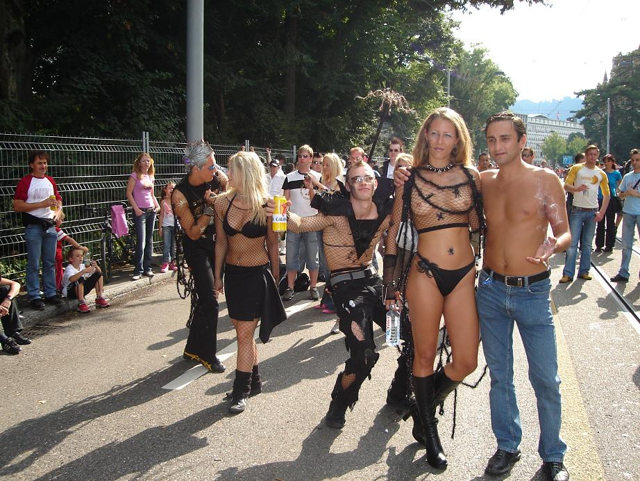 Zürich Street Parade 2005.